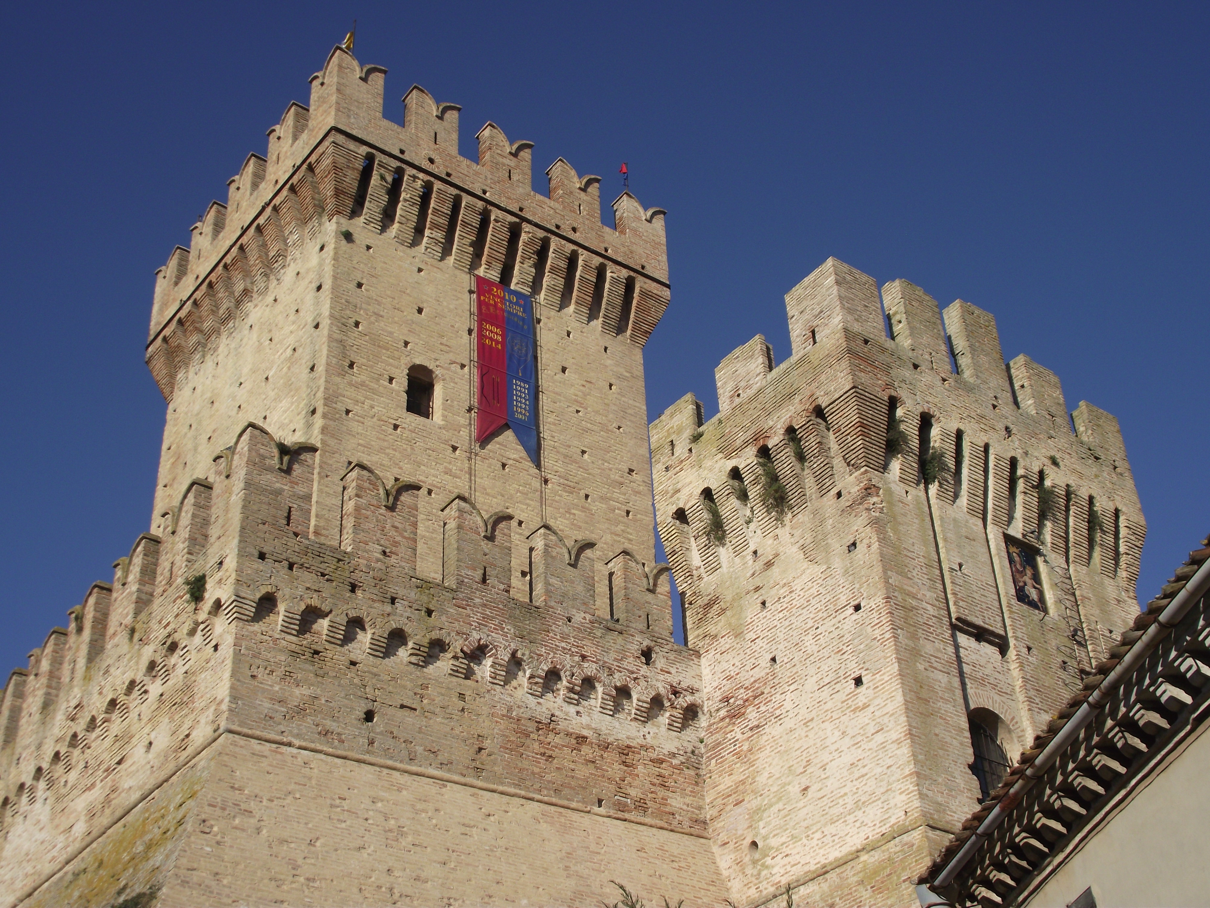 Offagna, Rocca, 1454